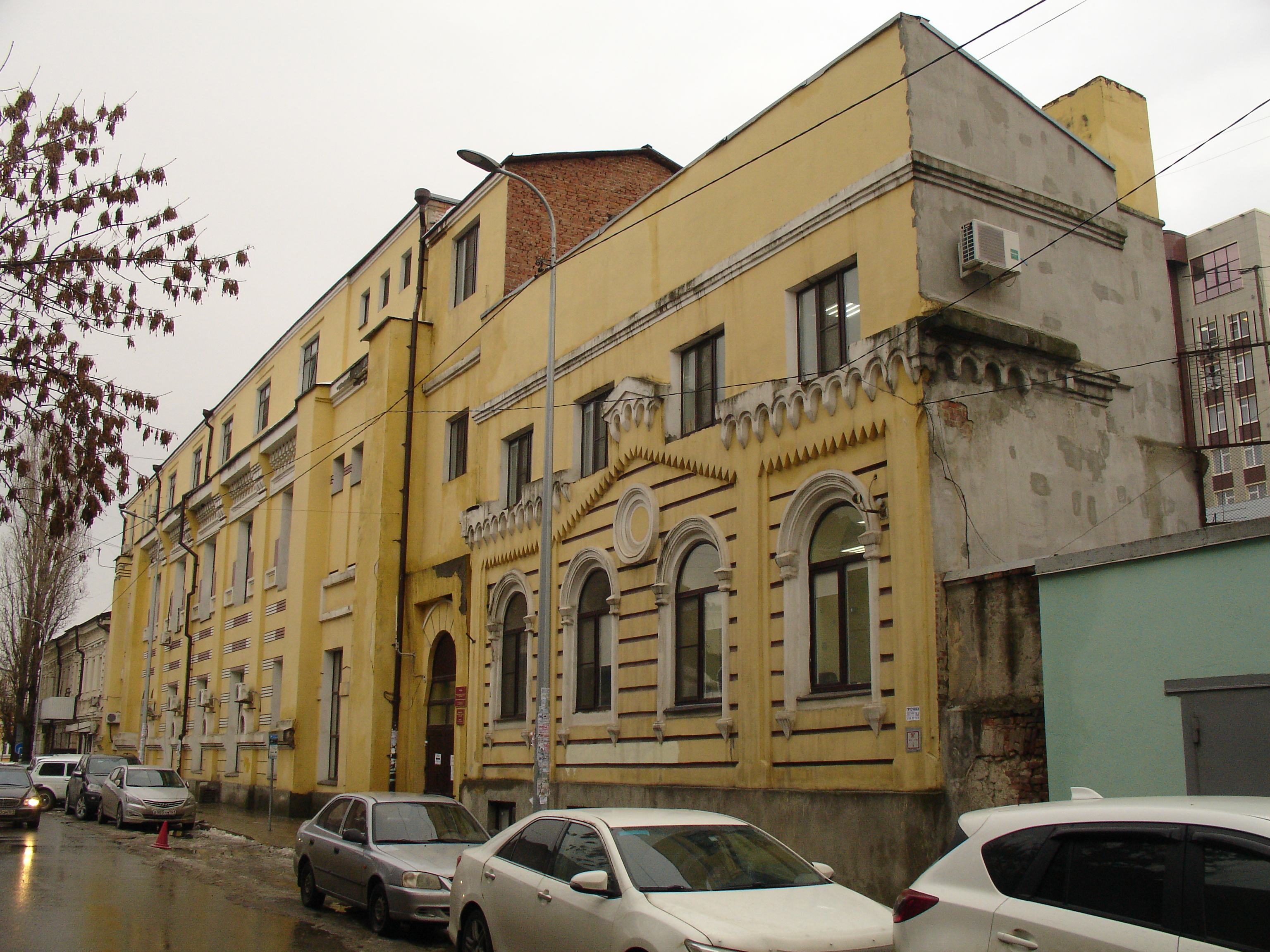 Здание главной хоральной синагоги: улица Баумана, 70, литеры А, Ж, Ростов-на-Дону, Ростовская область